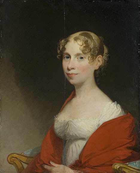 Евгения Иосифовна Дашкова (1783-1880), урожденная баронесса Прейссер, жена Андрея Яковлевича Дашкова (1778—1839), русского дипломата.